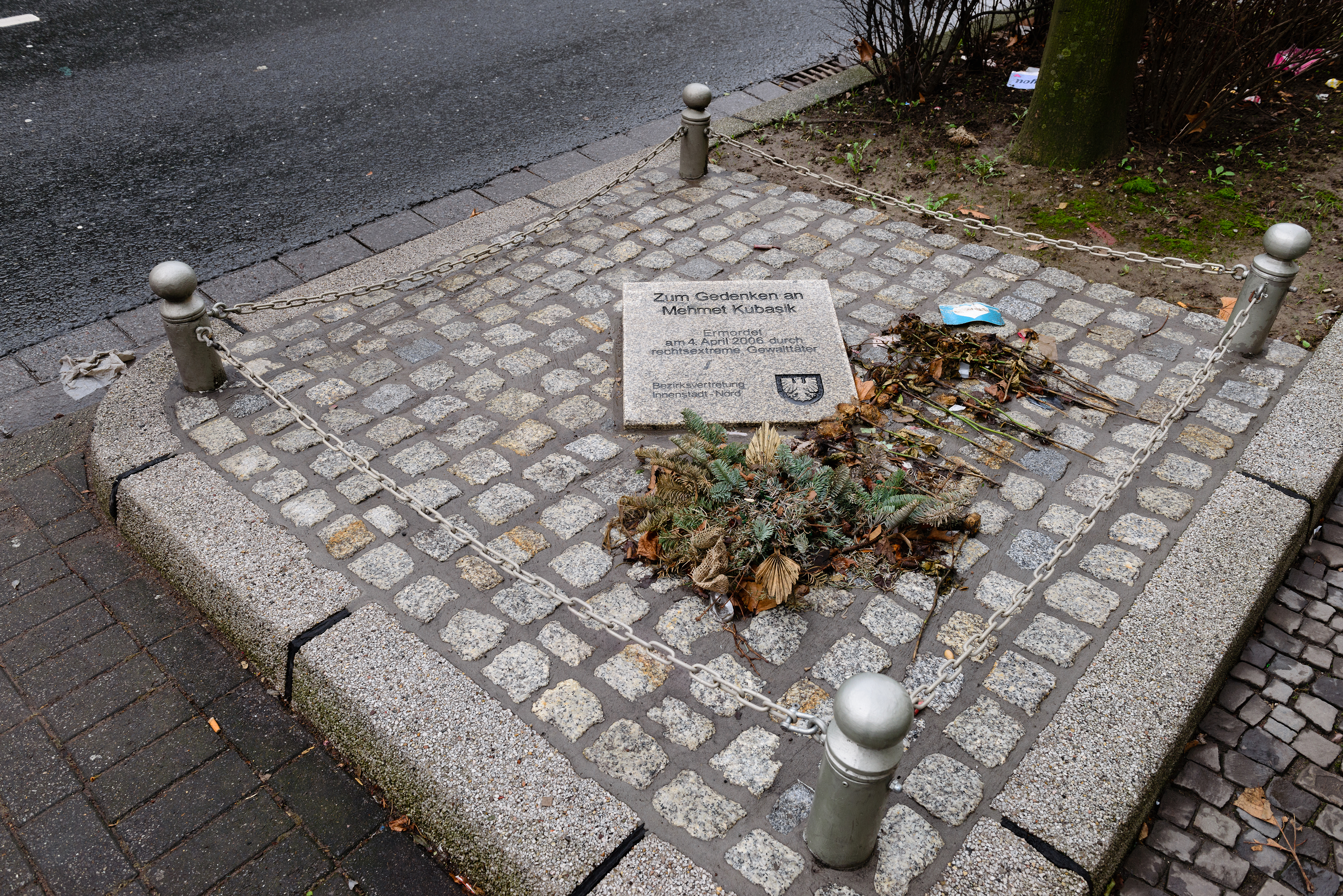 Am 4. April 2006 wurde Mehmet Kubasik von Rechtsextremisten in seinem Kiosk in der Mallinckrodtstraße 190 in Dortmund ermordet. Eine Gedenktafel vor dem ehemaligen Kiosk erinnert an das NSU-Mordopfer.